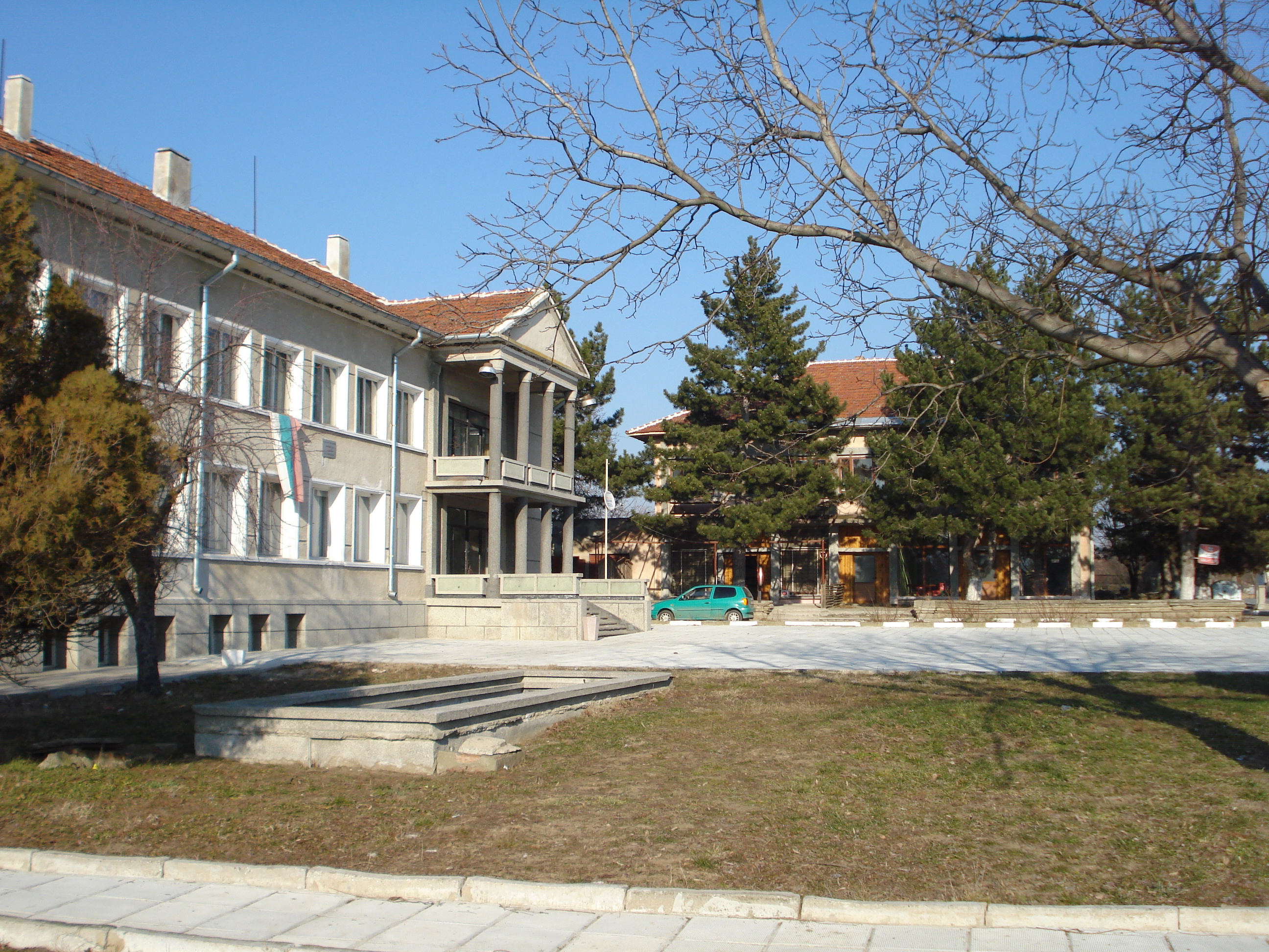 Читалище "Пробуда" в с.Пъдарево, котелско.